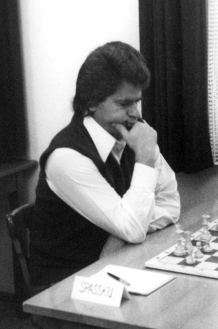 Boris Spasski